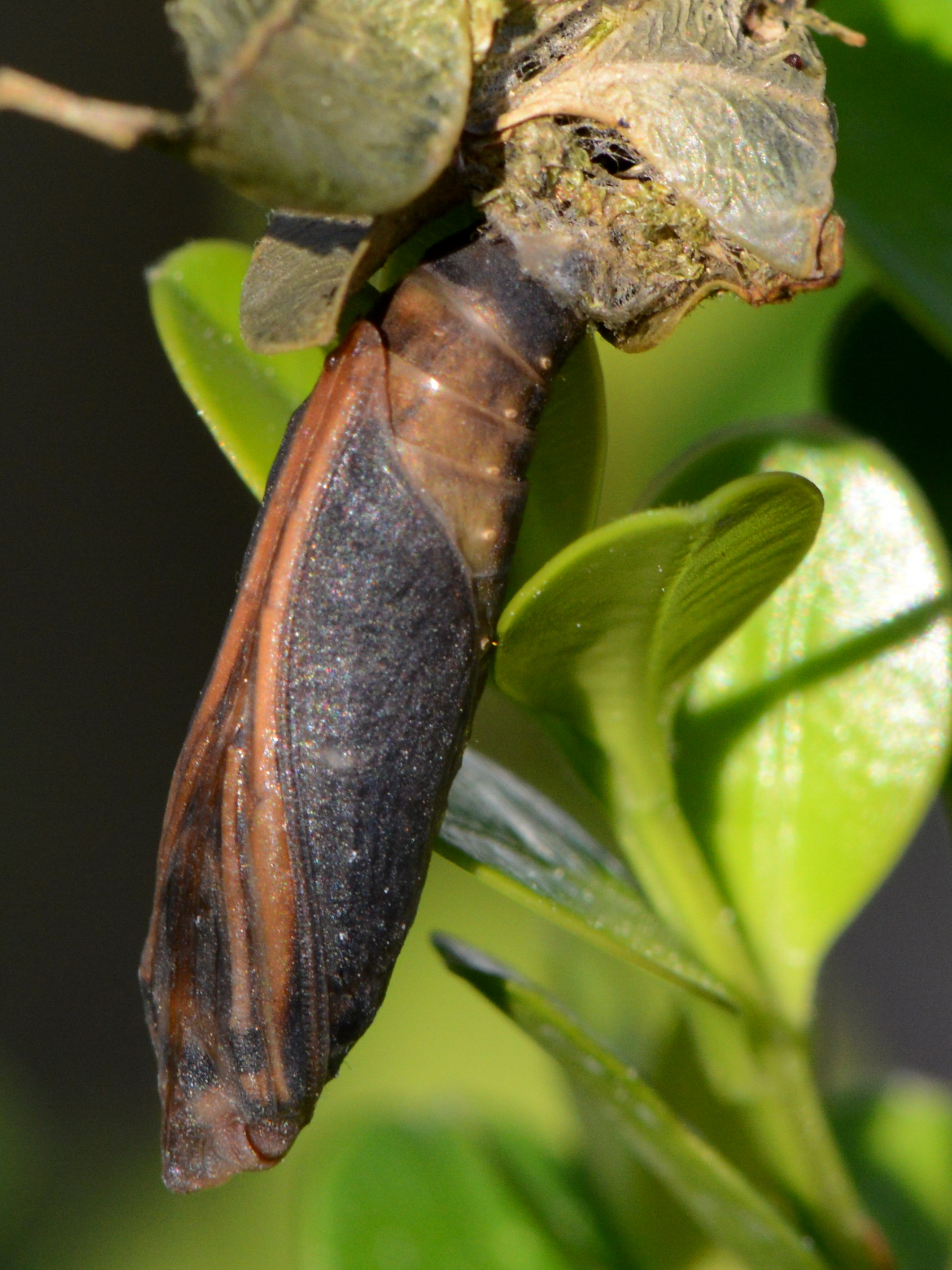 Puppe des Buchsbaumzünsler (Cydalima perspectalis).